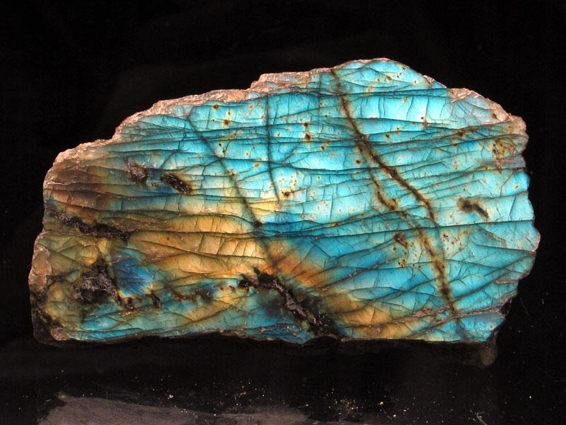 labradoryt, pochodzenie Madagaskar, autor zdjęcia Stowarzyszenie Spirifer